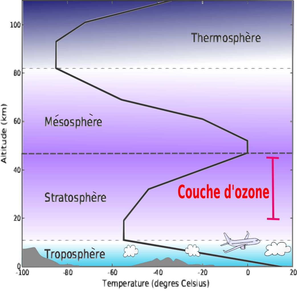 couches de l'atmosphere